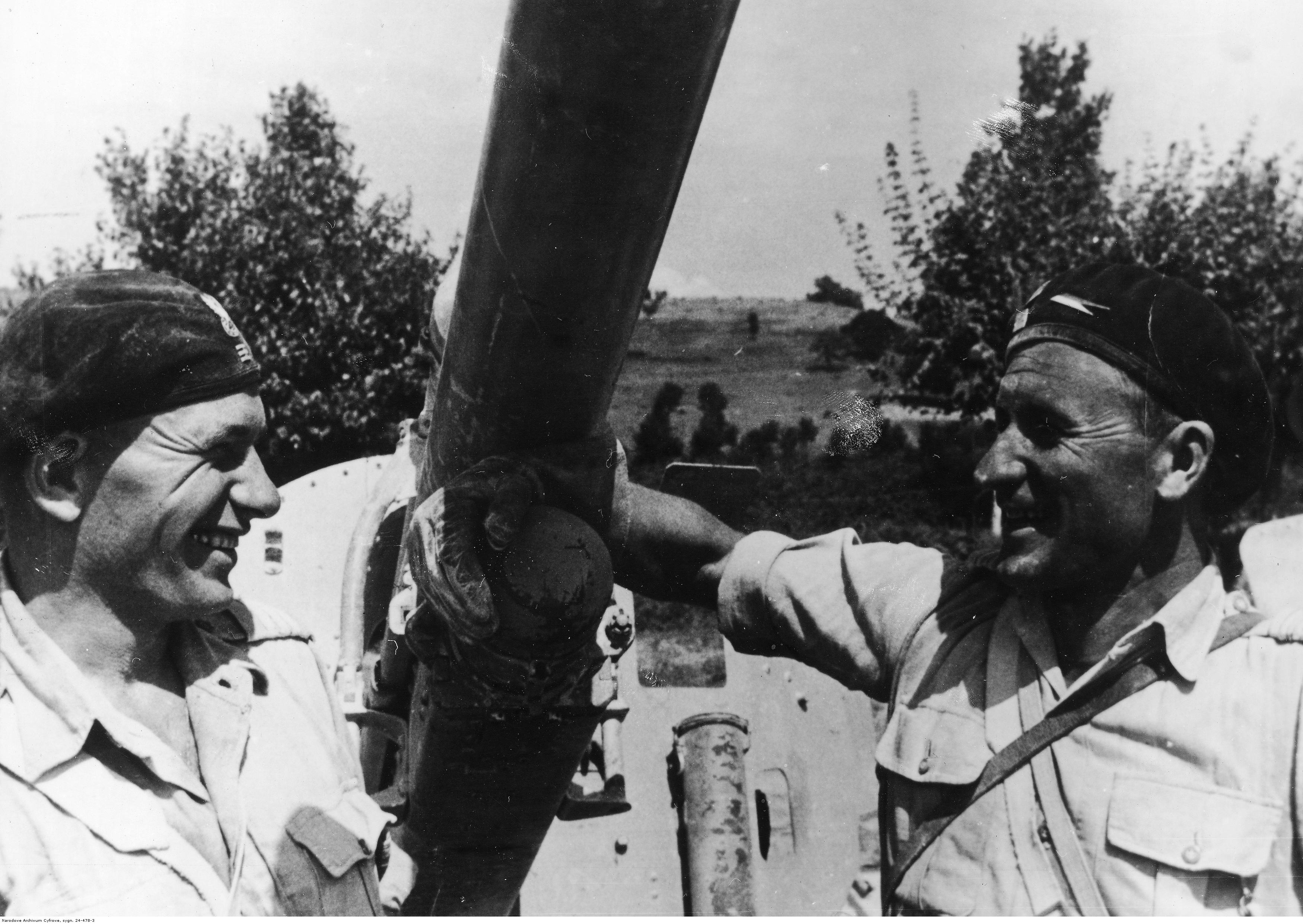 2 Korpus Polski po zakończeniu walk o Ankonę. Niemieckie działo przeciwpancerne zdobyte przez zmotoryzowanych gońców 1 Pułku Ułanów Krechowieckich. Archiwum Fotograficzne Tadeusza Szumańskiego. Sygnatura: 24-478-3